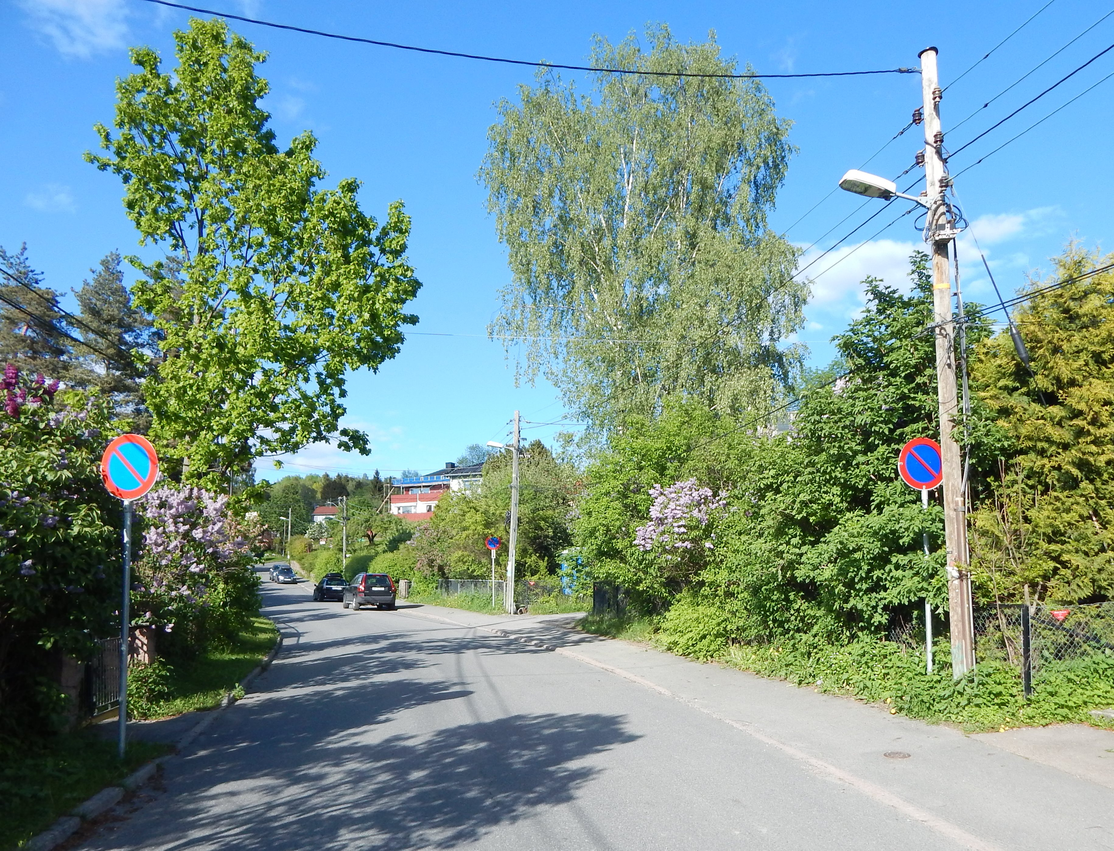 Nils Bays vei